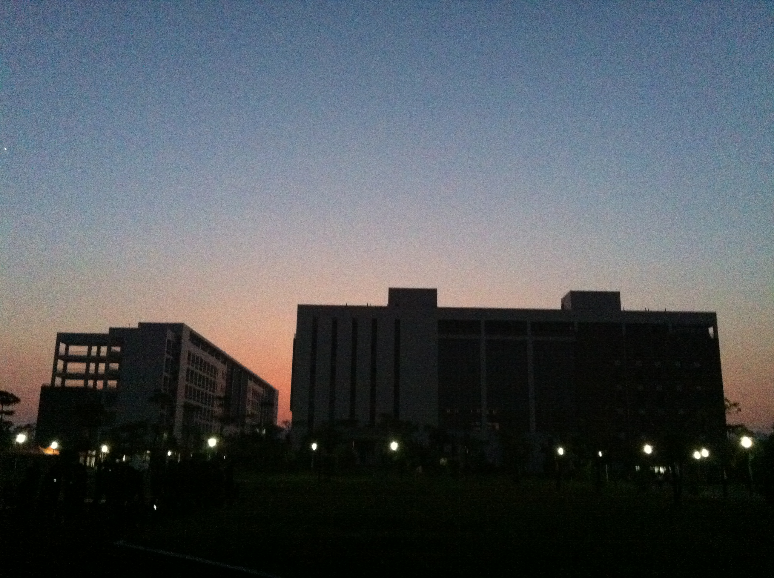 中文（中国大陆）: 摄于广东第二师范学院花都校区